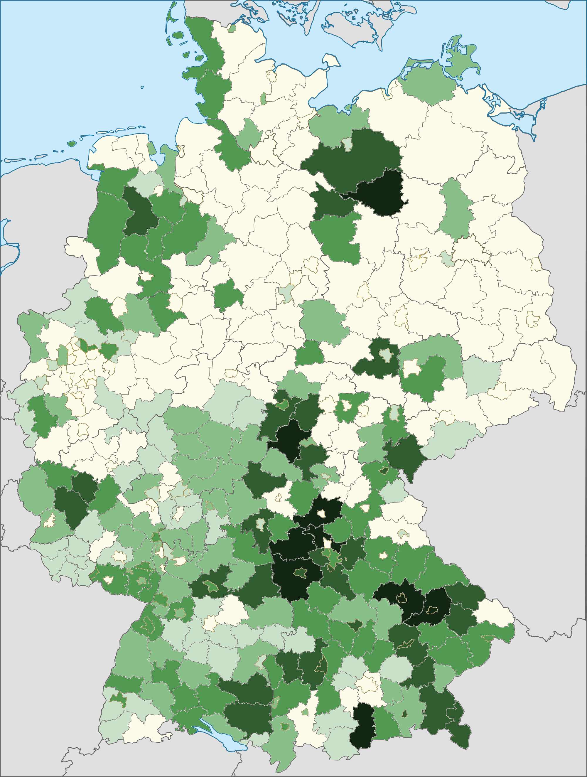 Karte der Personen mit rumänischer Staatsangehörigkeit und deren relativer Häufigkeit in den Landkreisen 2014. Dunkelgrün: häufigste ausländische Staatsangehörigkeit in diesem Kreis, hellgrün: fünfthäufigste ausländische Staatsangehörigkeit in diesem Kreis, weiß: sechsthäufig oder weniger. Quelle: Ausländerzentralregister, Stand 31. Dezember 2014. Saarland: keine Daten auf Kreisebene (dargestellt ist die Landesebene). Deutschlandweite relative Häufigkeit der ausländischen Staatsangehörigkeit Rumänien: Platz 4.